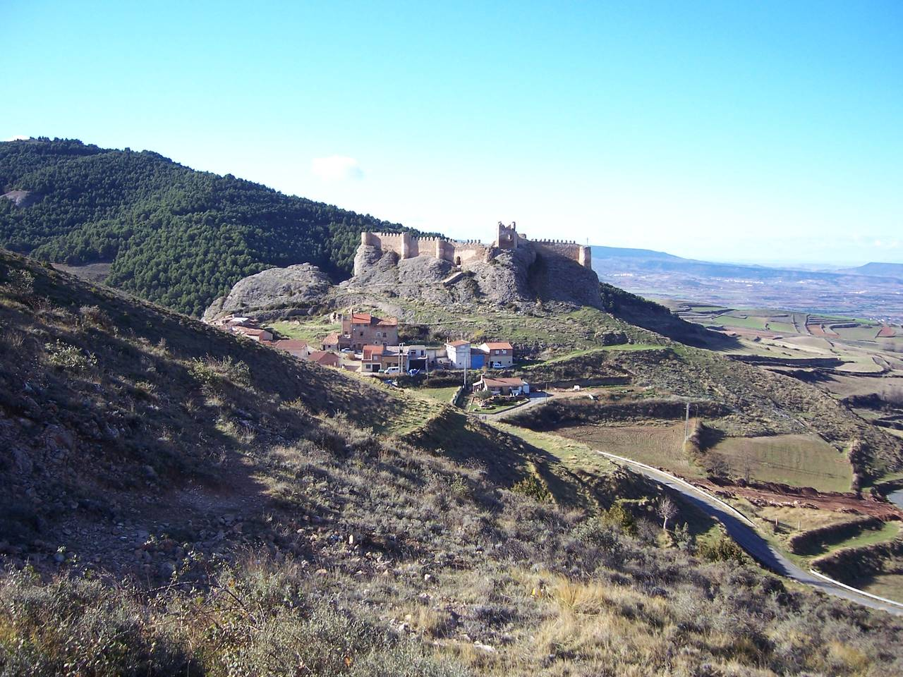 Vista del pueblo de Clavijo y su Castillo